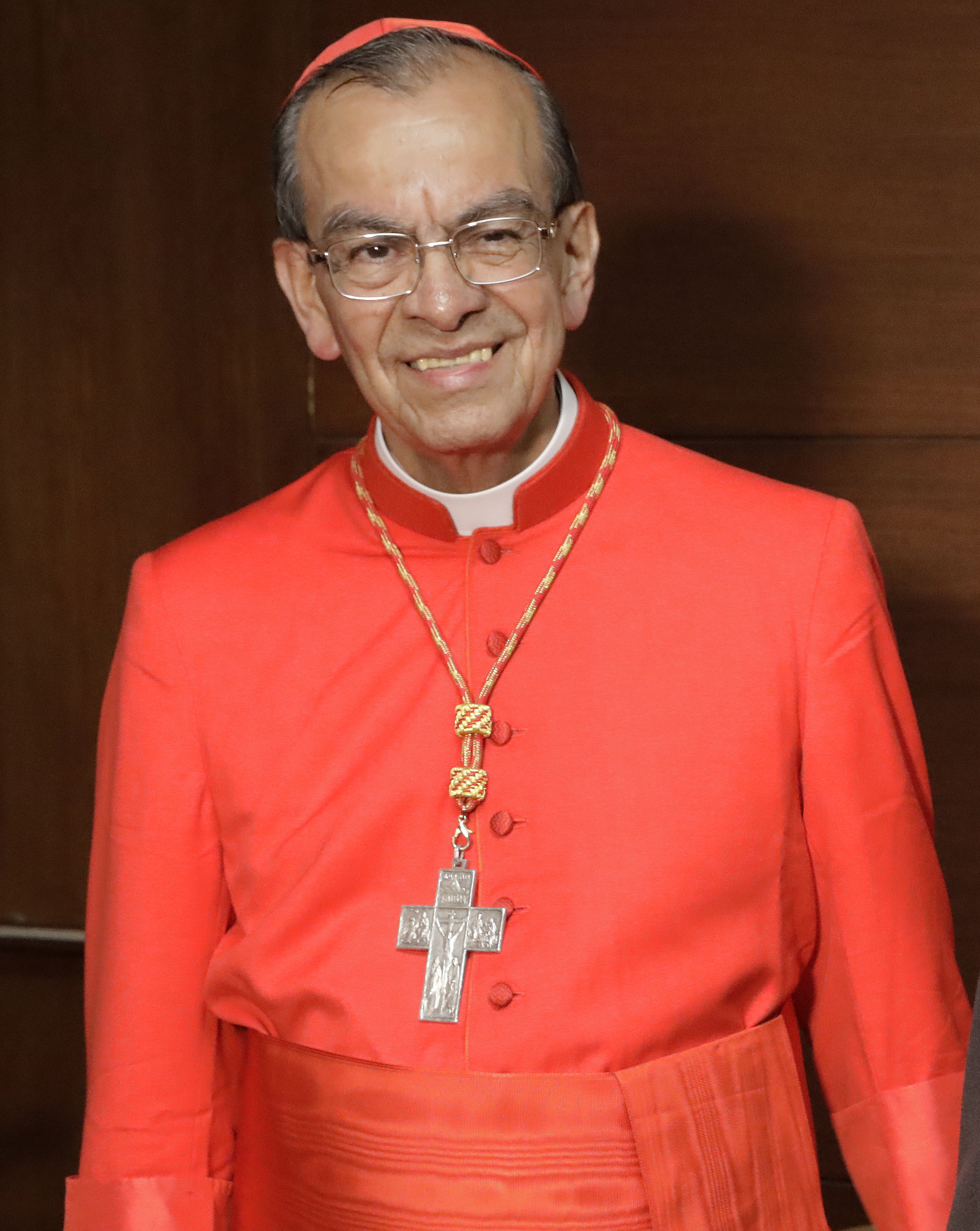 Recibimiento a Cardenal Gregorio Rosa Chávez.